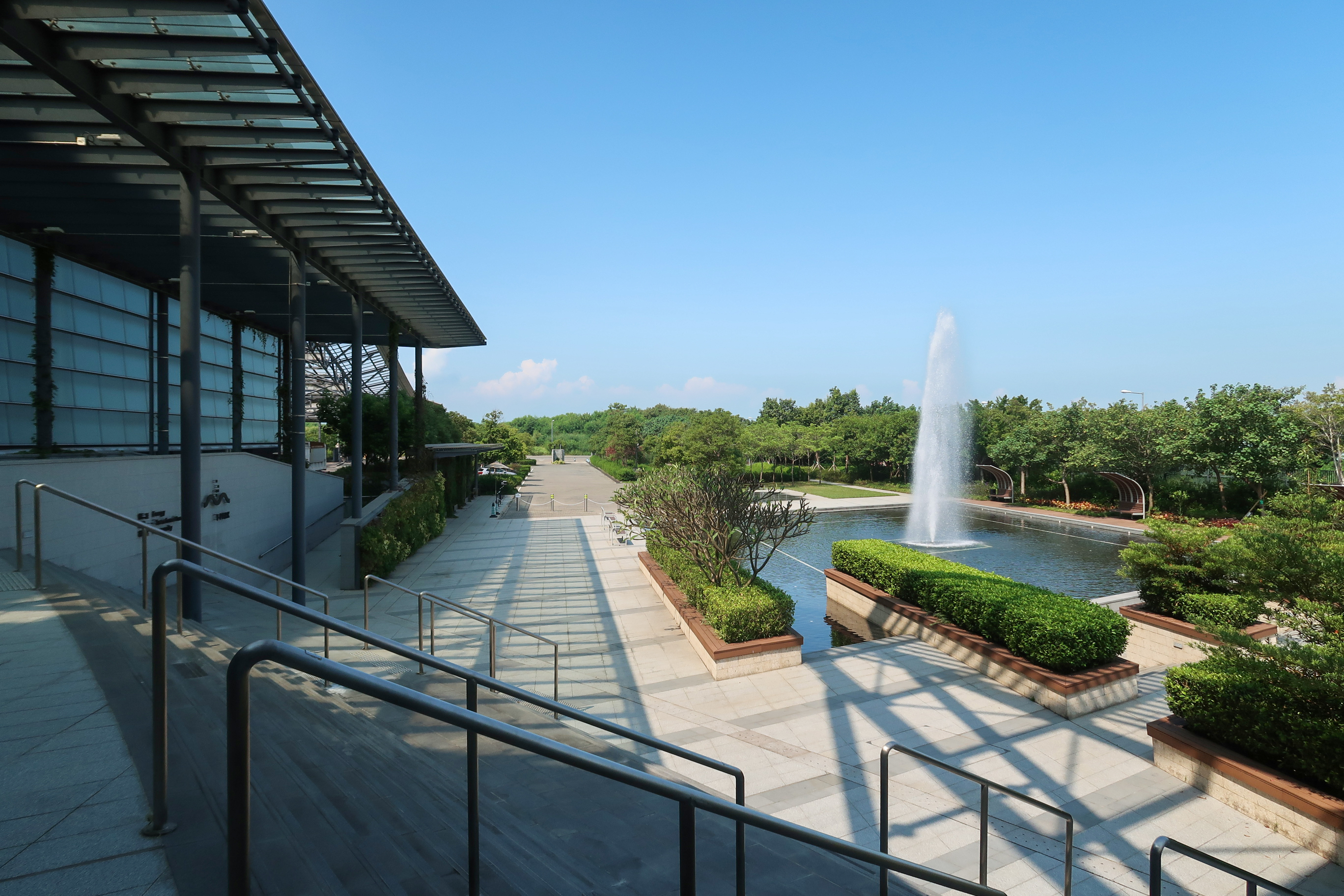 T Park